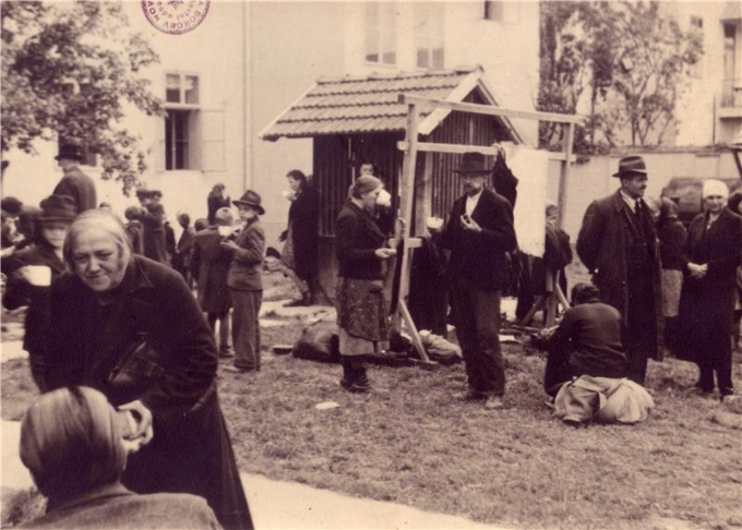 Slovenski izgnanci v Bjelovarju na Hrvaškem